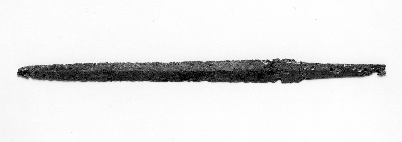 Japanese; Straight, double-edged sword blade (Ken); Swords